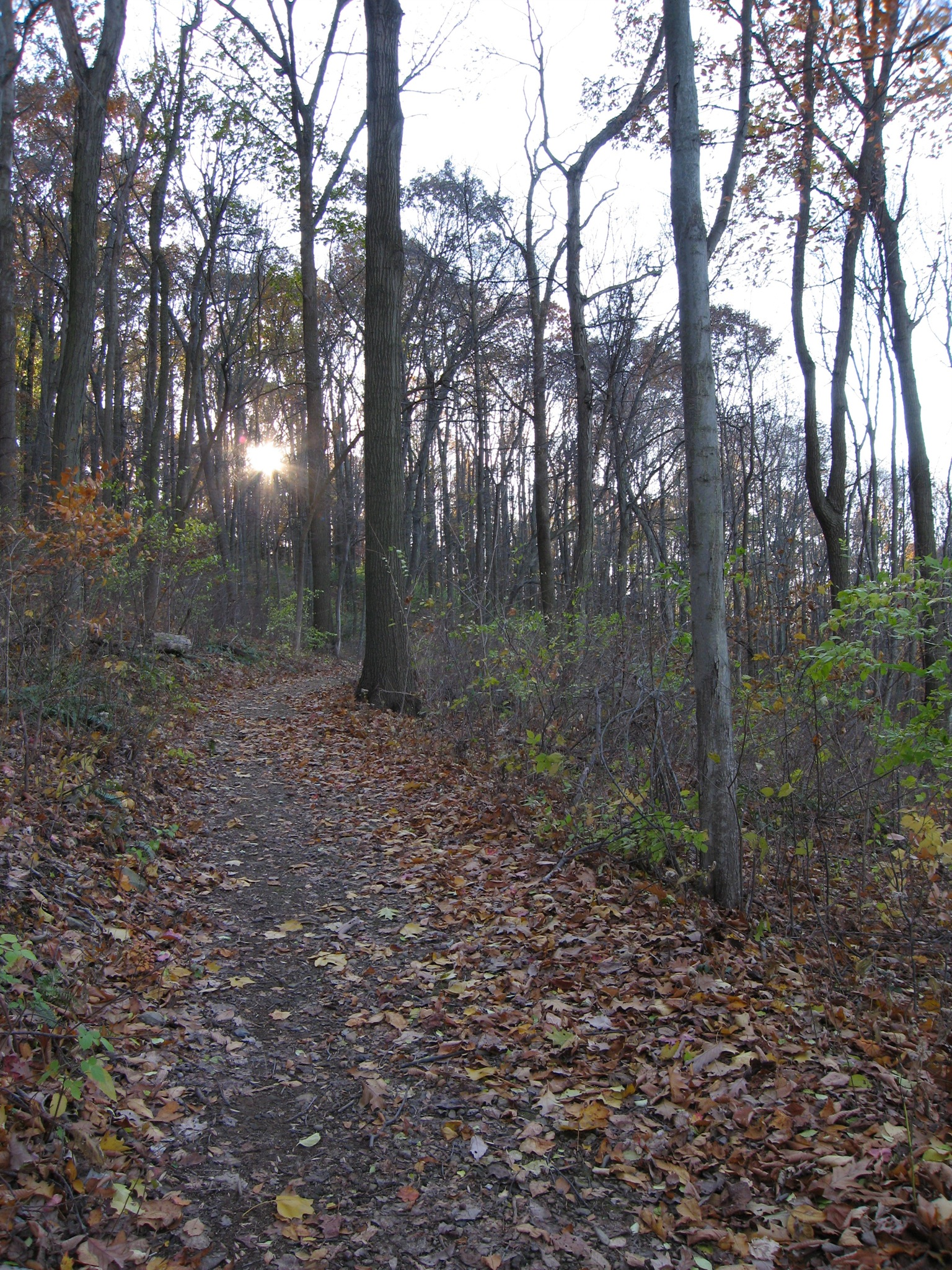 Hiking trail at Nolde Forest